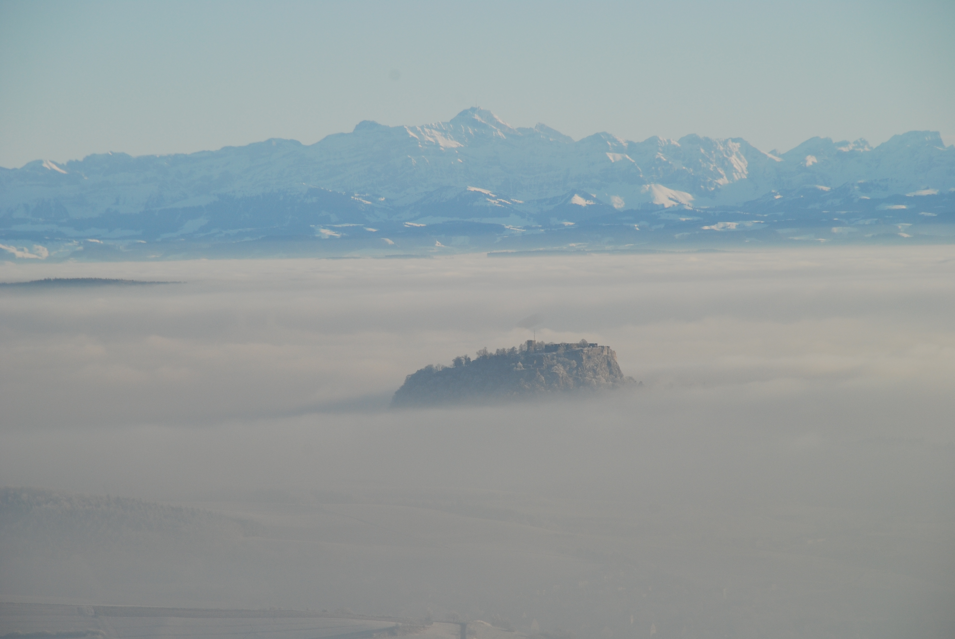 Hohentwiel